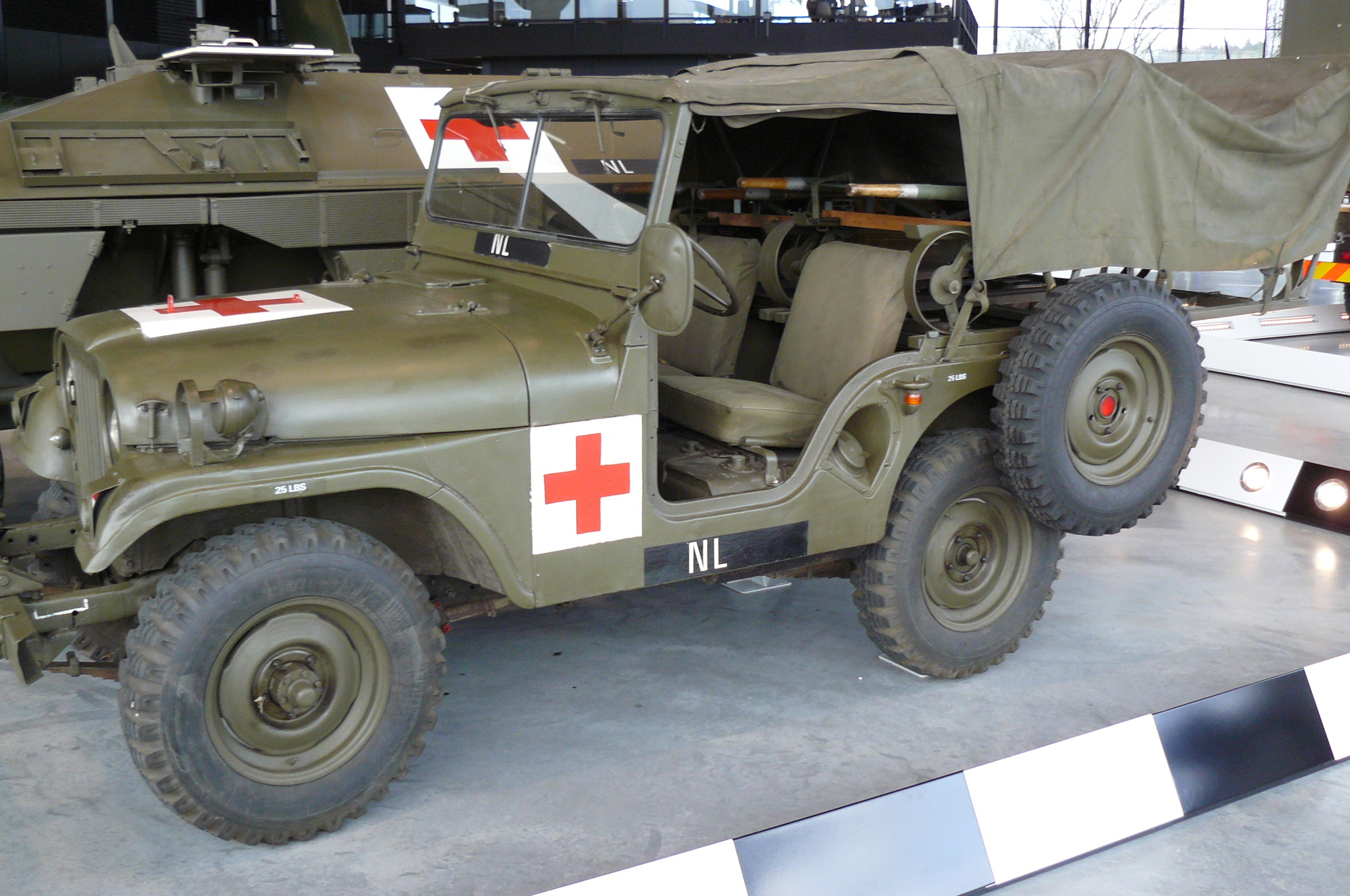 Nekaf jeep: Ambulance. Foto genomen in het Nationaal Militair Museum